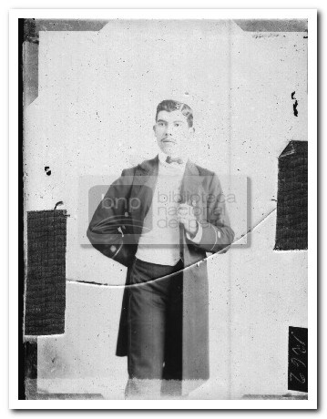 Foto de 1905 del ex ministro peruviano Hector Mercado Silva